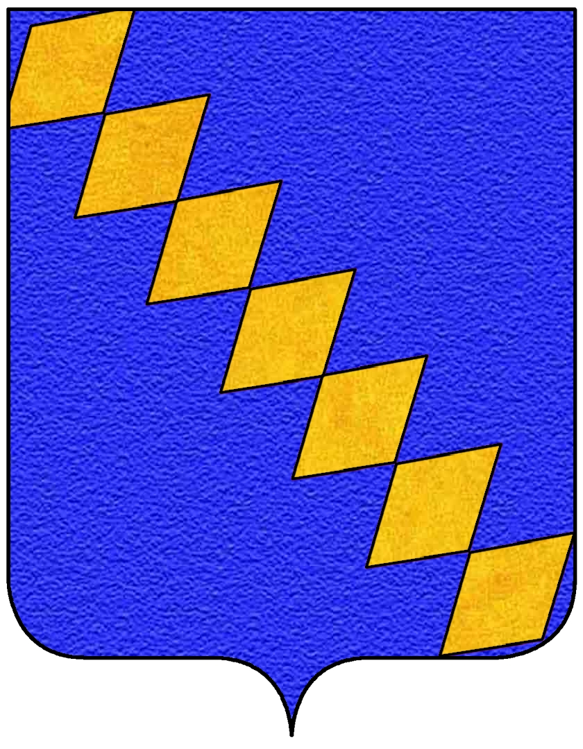 Stemma della famiglia vicentina dei Valmarana, appartenente anche al patriziato di Venezia.